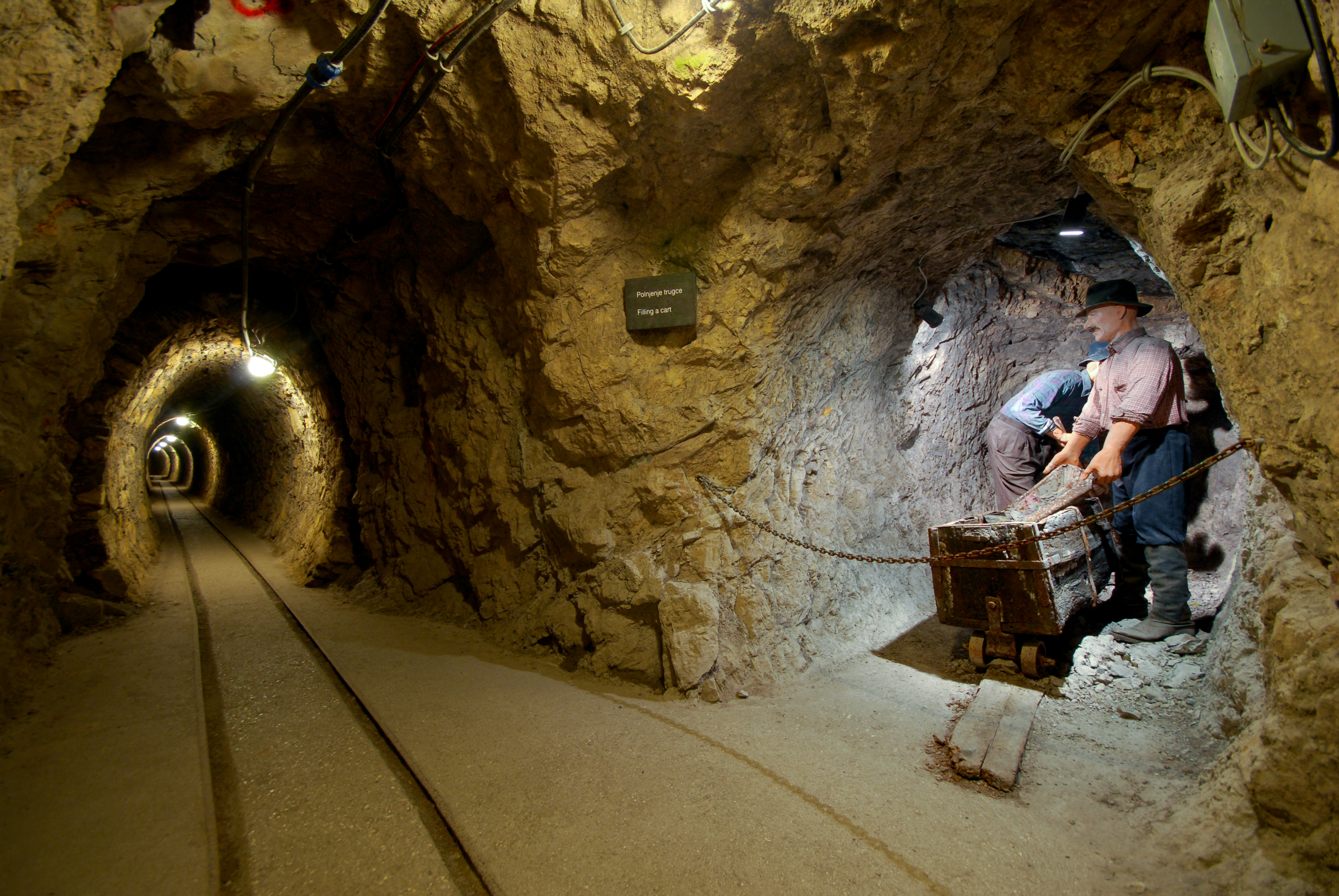 Antonijev rov